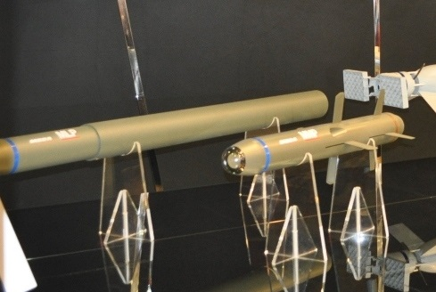 Stand MBDA au Salon du Bourget 2011, Battlefield engagement de gauche à droite : Missile Longue Portée Missile Moyenne Portée